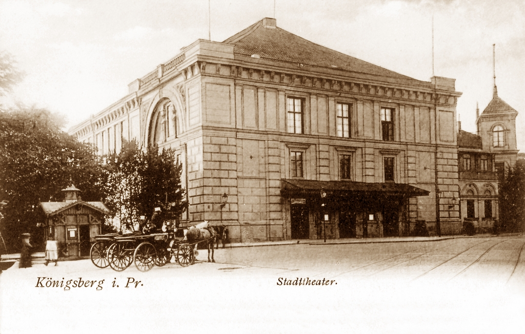 Königsberg